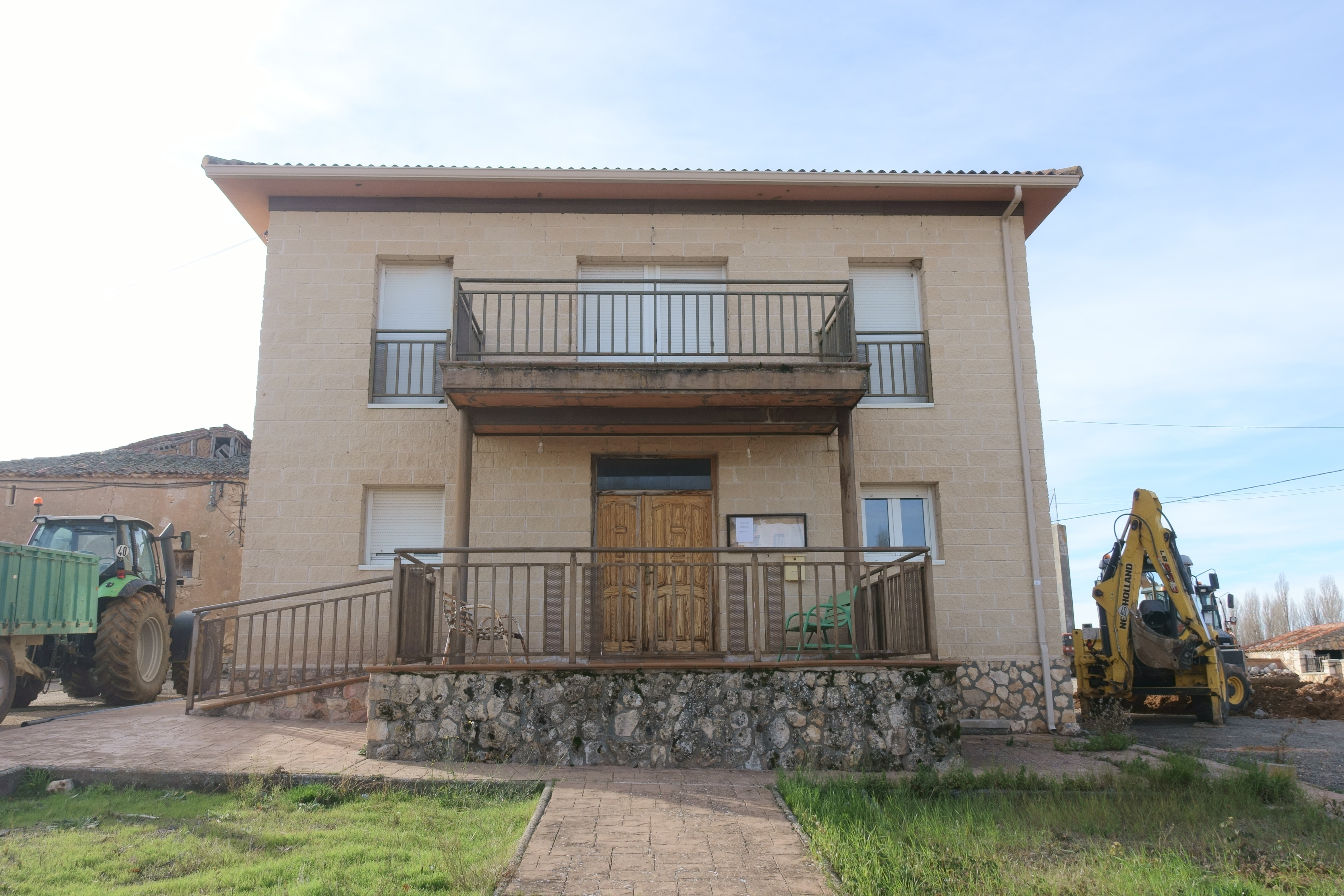 Casa consistorial de Pajarejos (Segovia, España).